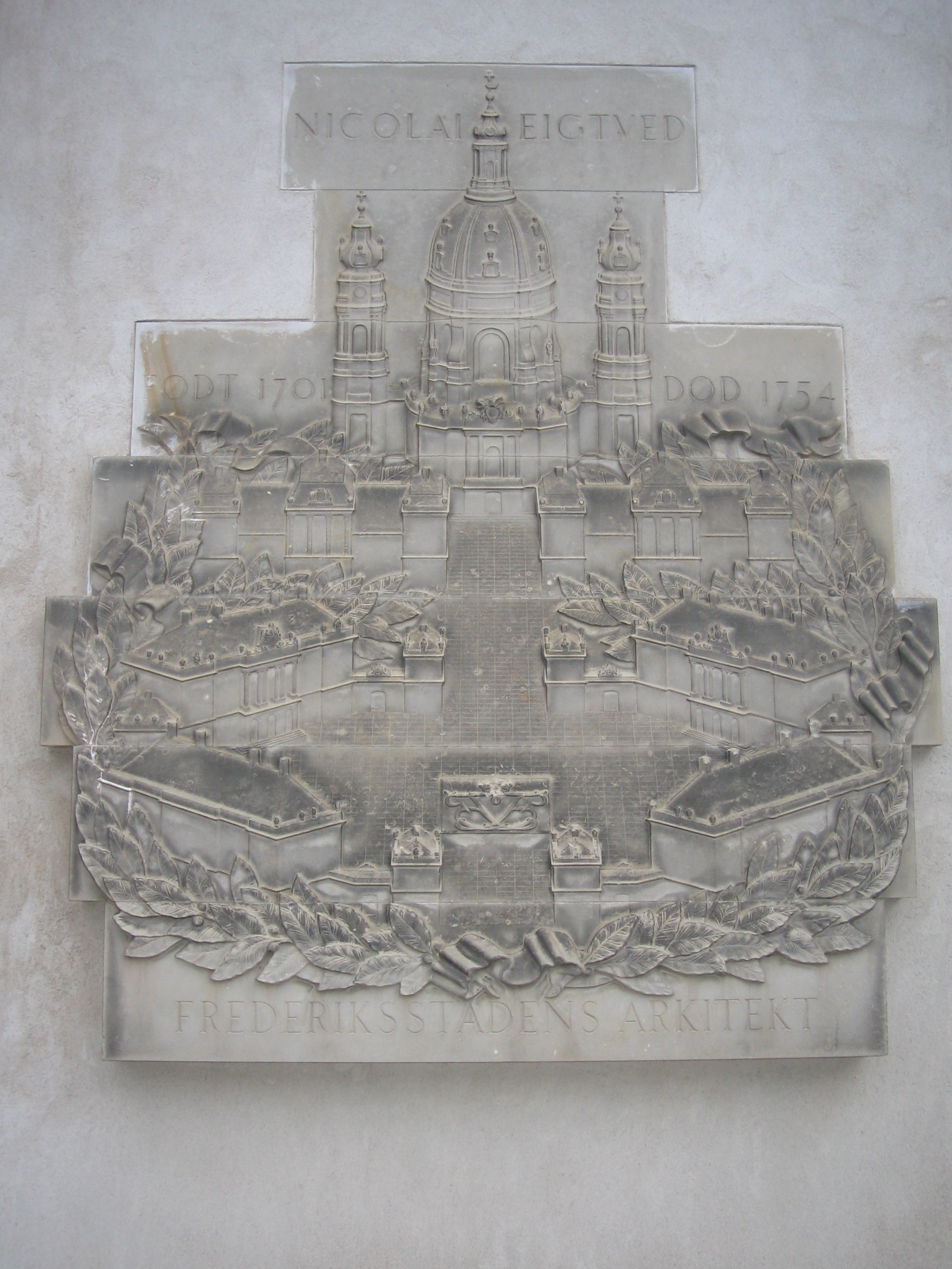 Frederiksstadens oprindelige plan - relief der er placeret ved Amalienborg. Reliefet mindes arkitekten Nicolai Eigtved (1701-1754.)